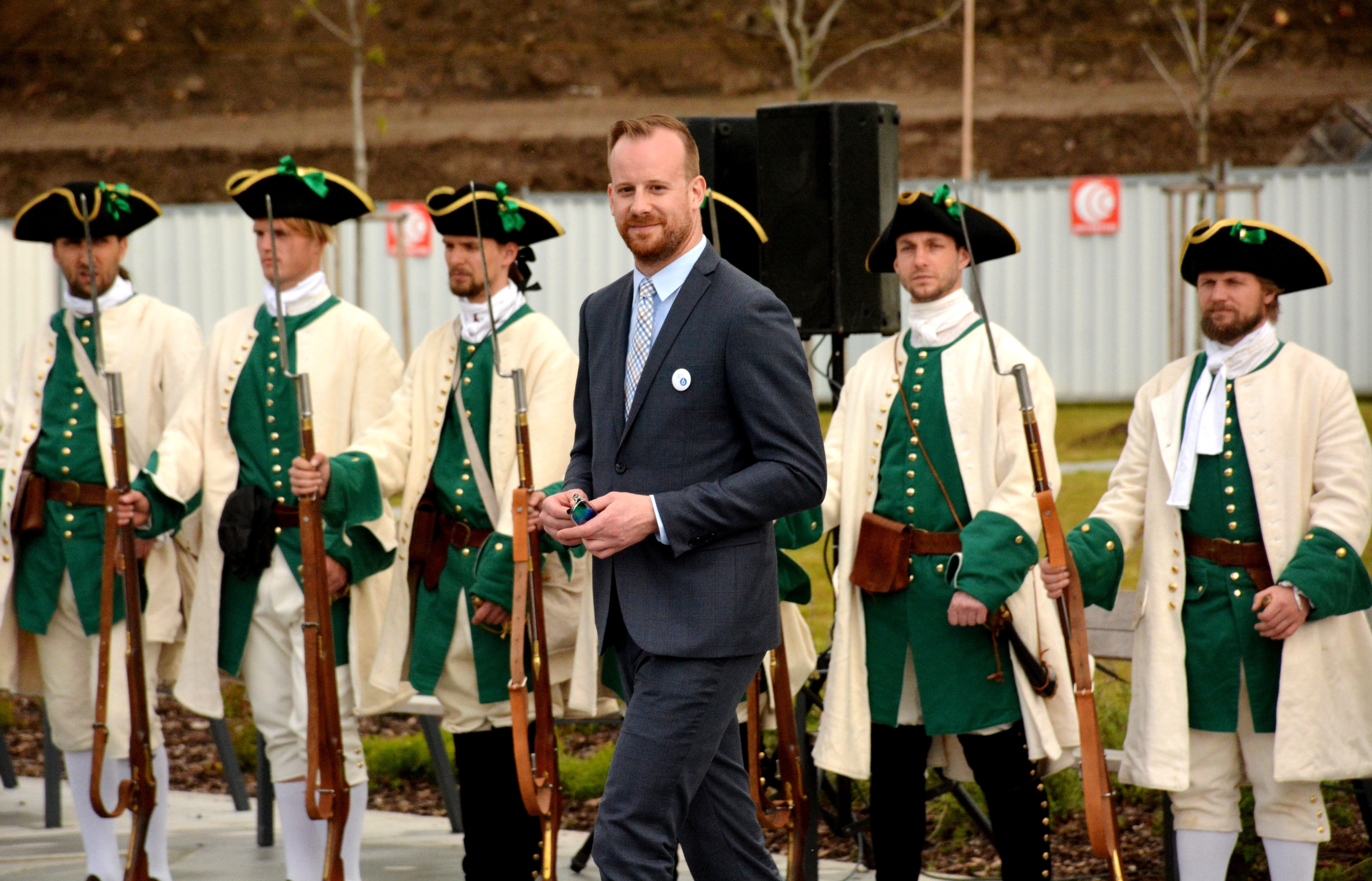 Ondřej Kolář, starosta Prahy 6, český politik